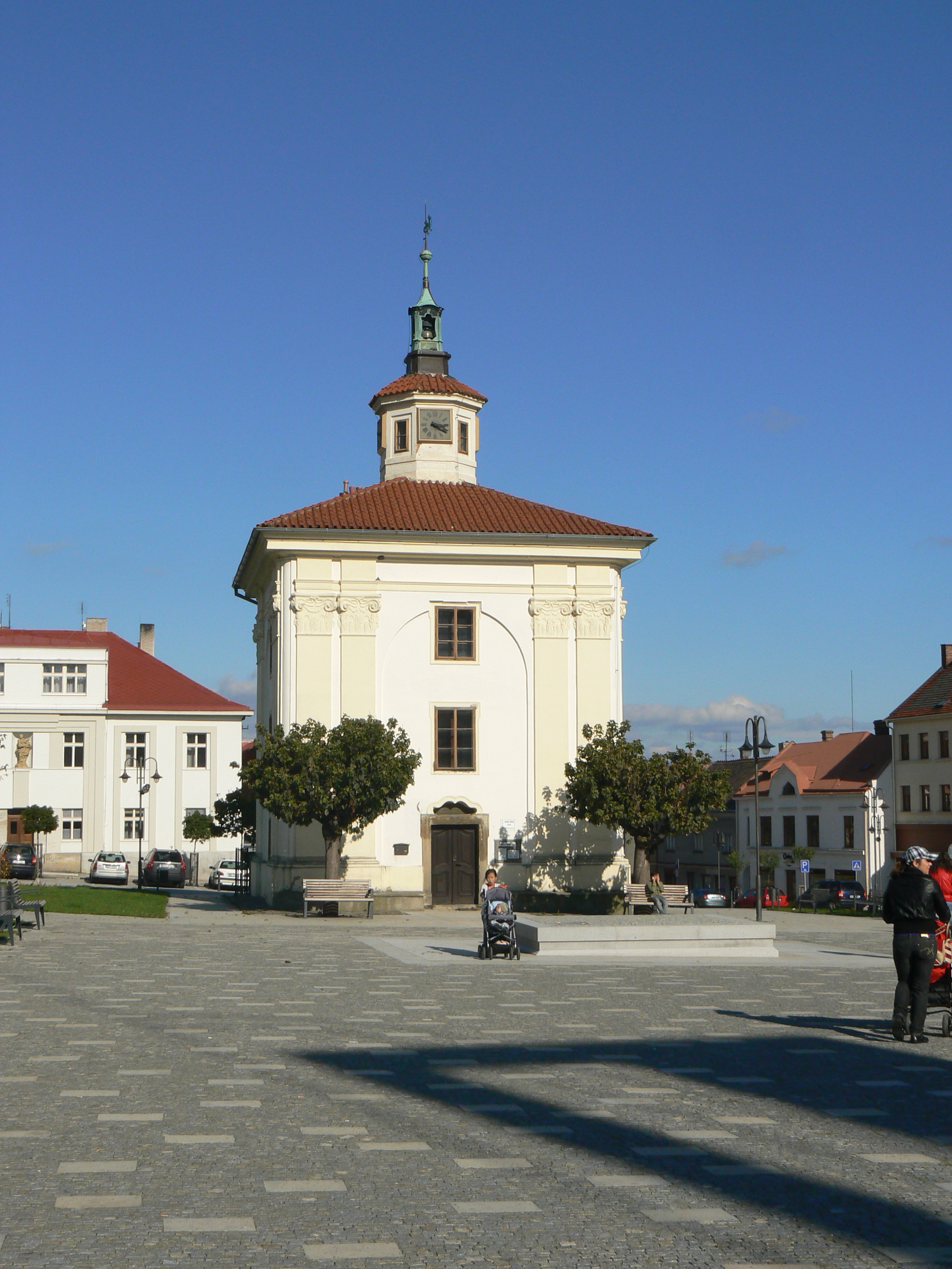 Kaple svaté Rodiny, Husovo náměstí 1/38, Benátky nad Jizerou I, Benátky nad Jizerou.